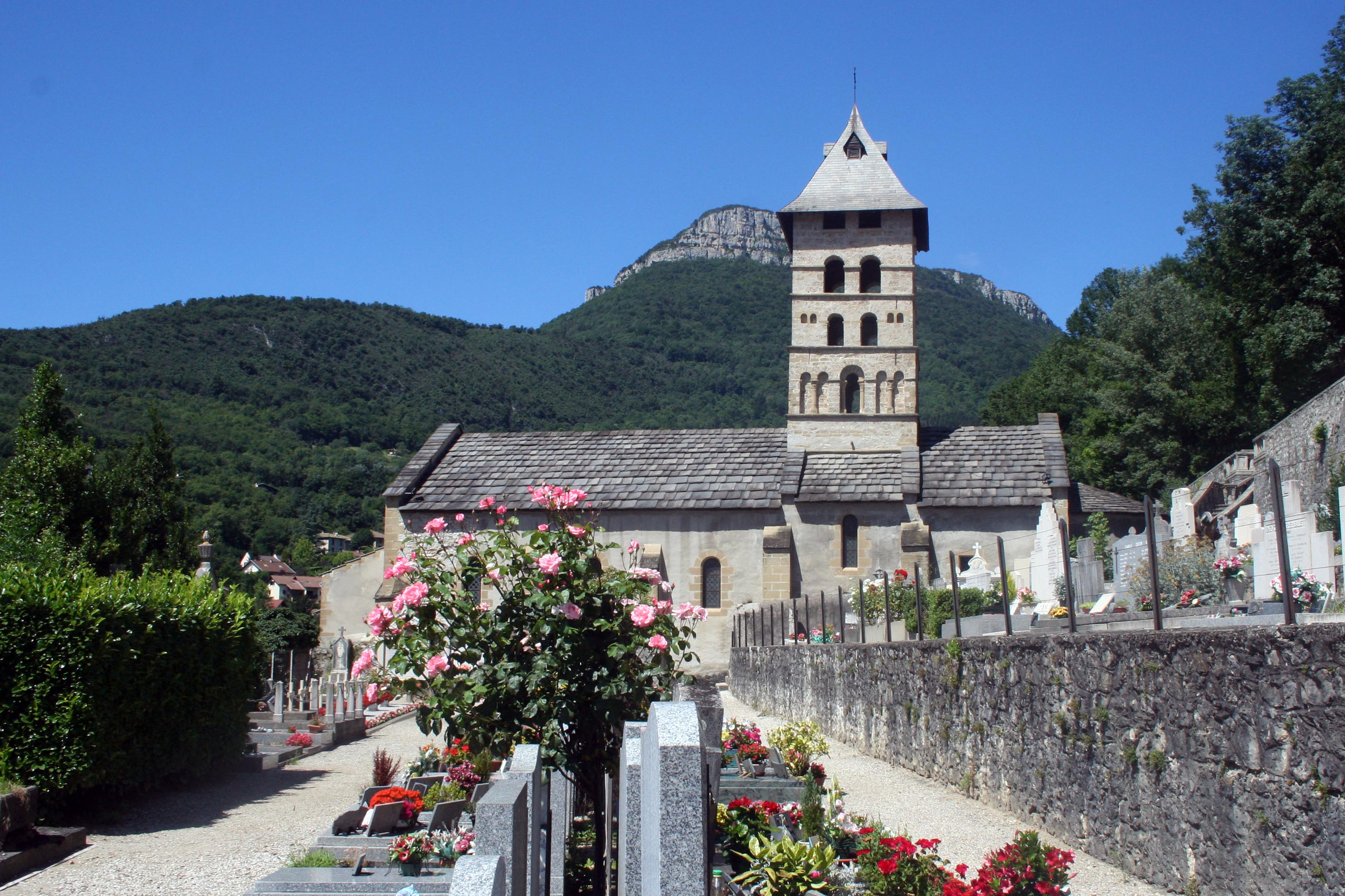 Ancienne église du prieuré Saint-Didier (XIIe S.) à Voreppe (Isère, France)